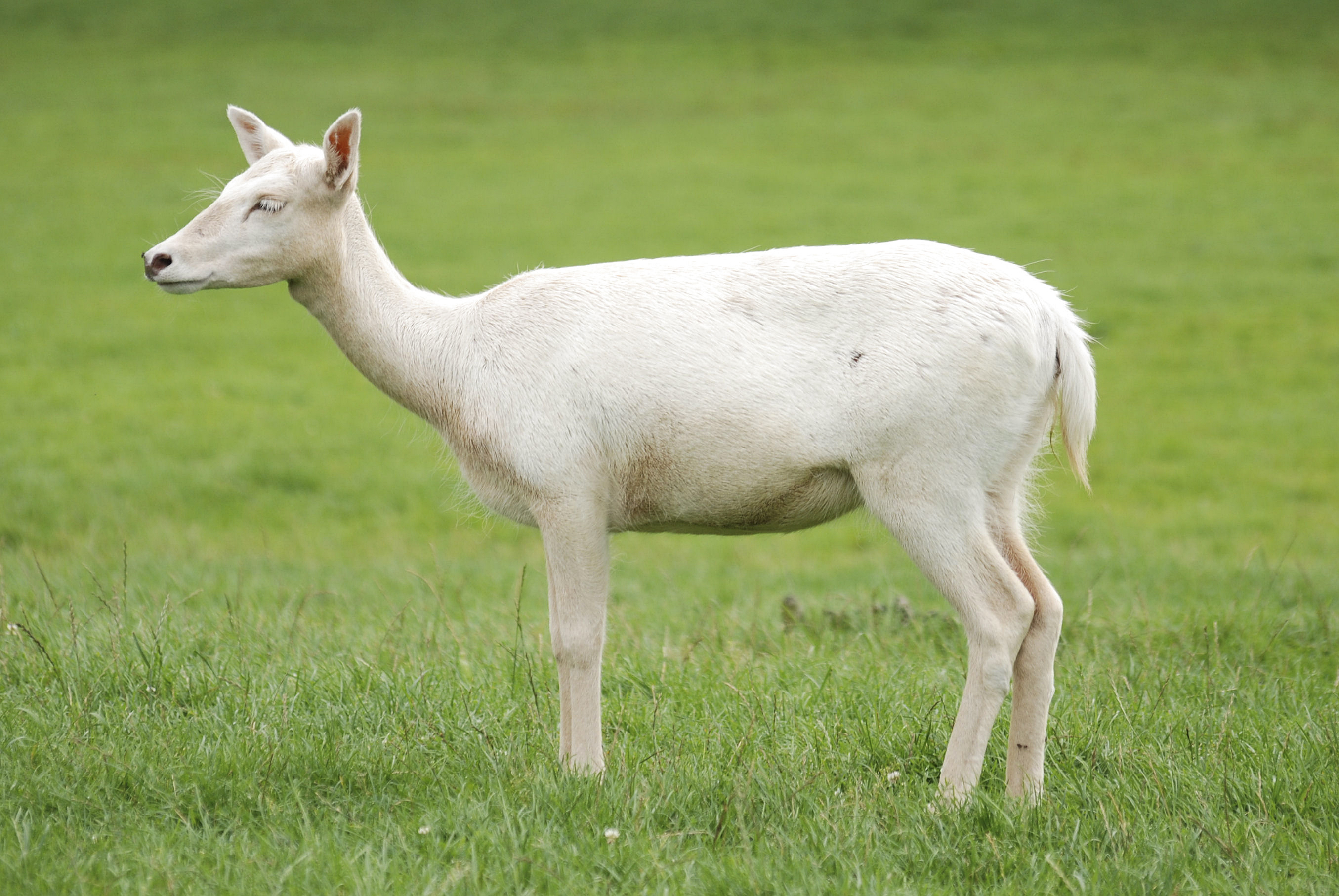 Dama dama in Kadzidłowo